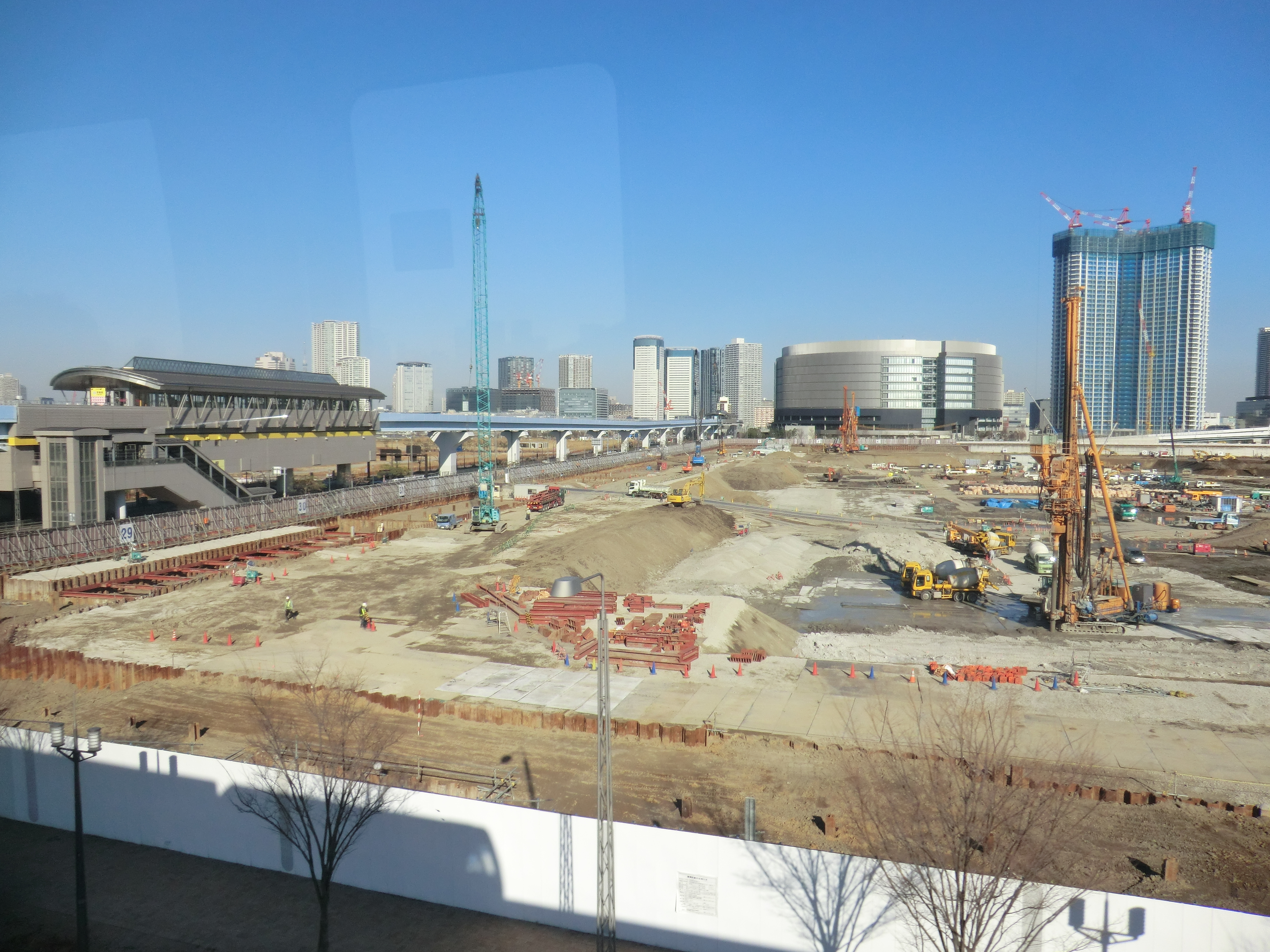 ゆりかもめ（東京臨海新交通線）市場前駅と豊洲新市場計画地（建設中）